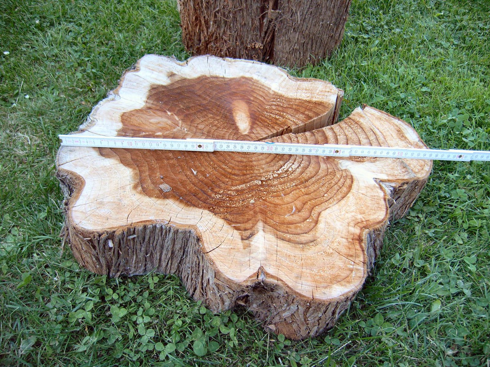 Urweltmammutbaum Metasequoia glyptostroboides, alter 25 Jahre